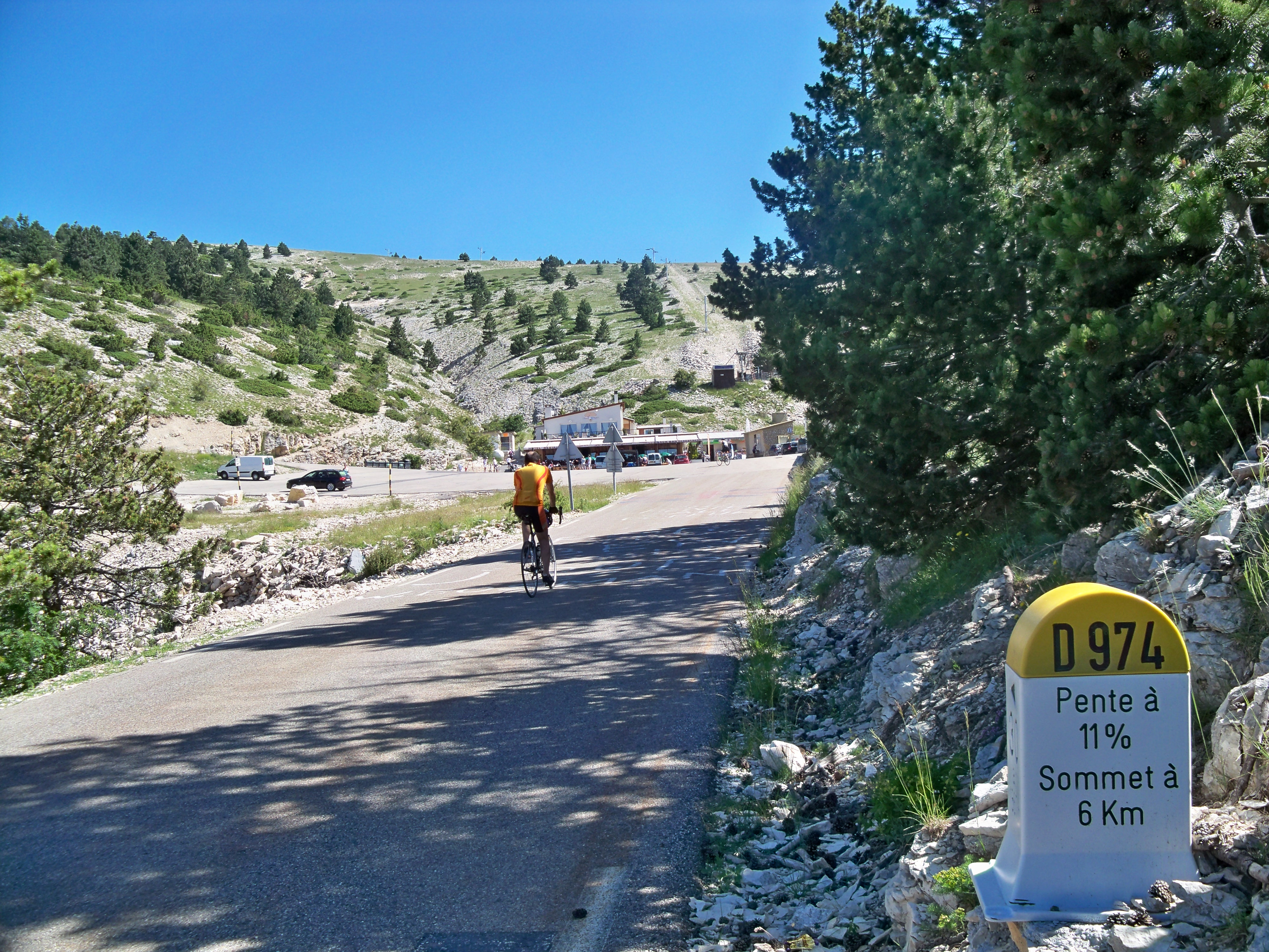 Accès au Mont Ventoux par le Chalet Reynard (au fond)